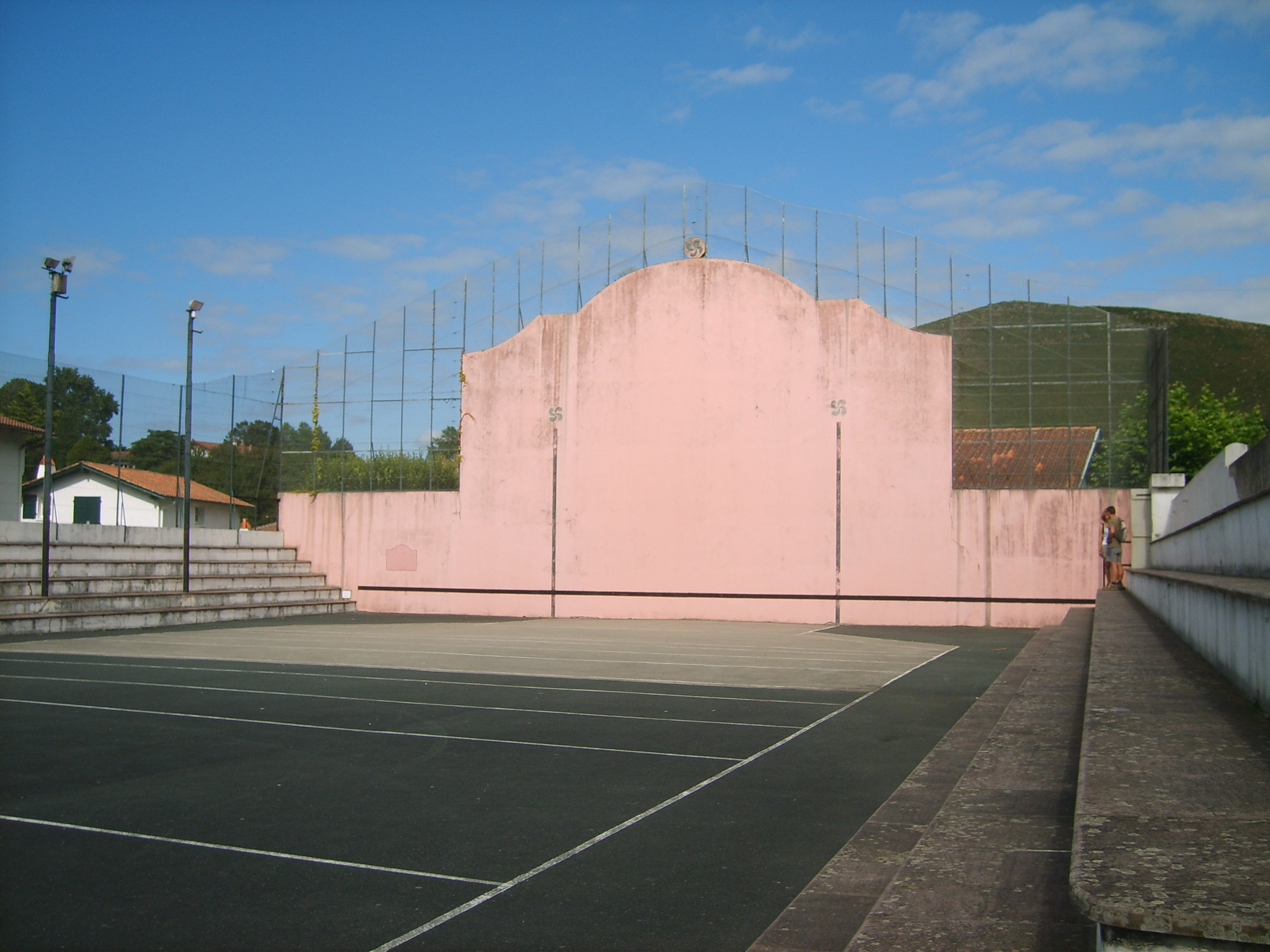 Fronton Ascain, Pyrénées-Atlantiques (64), France